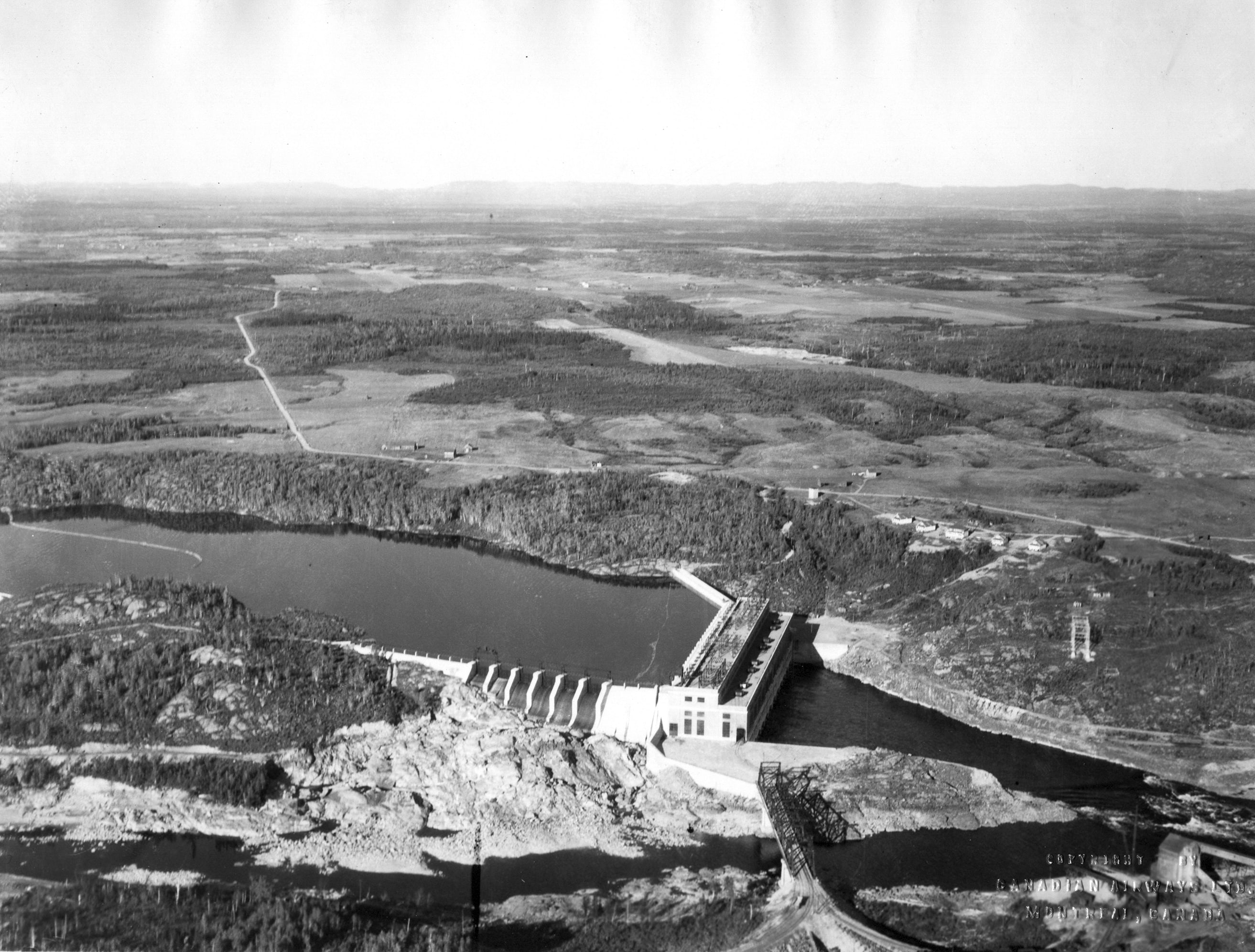 Vue aérienne du barrage de l'Isle Maligne